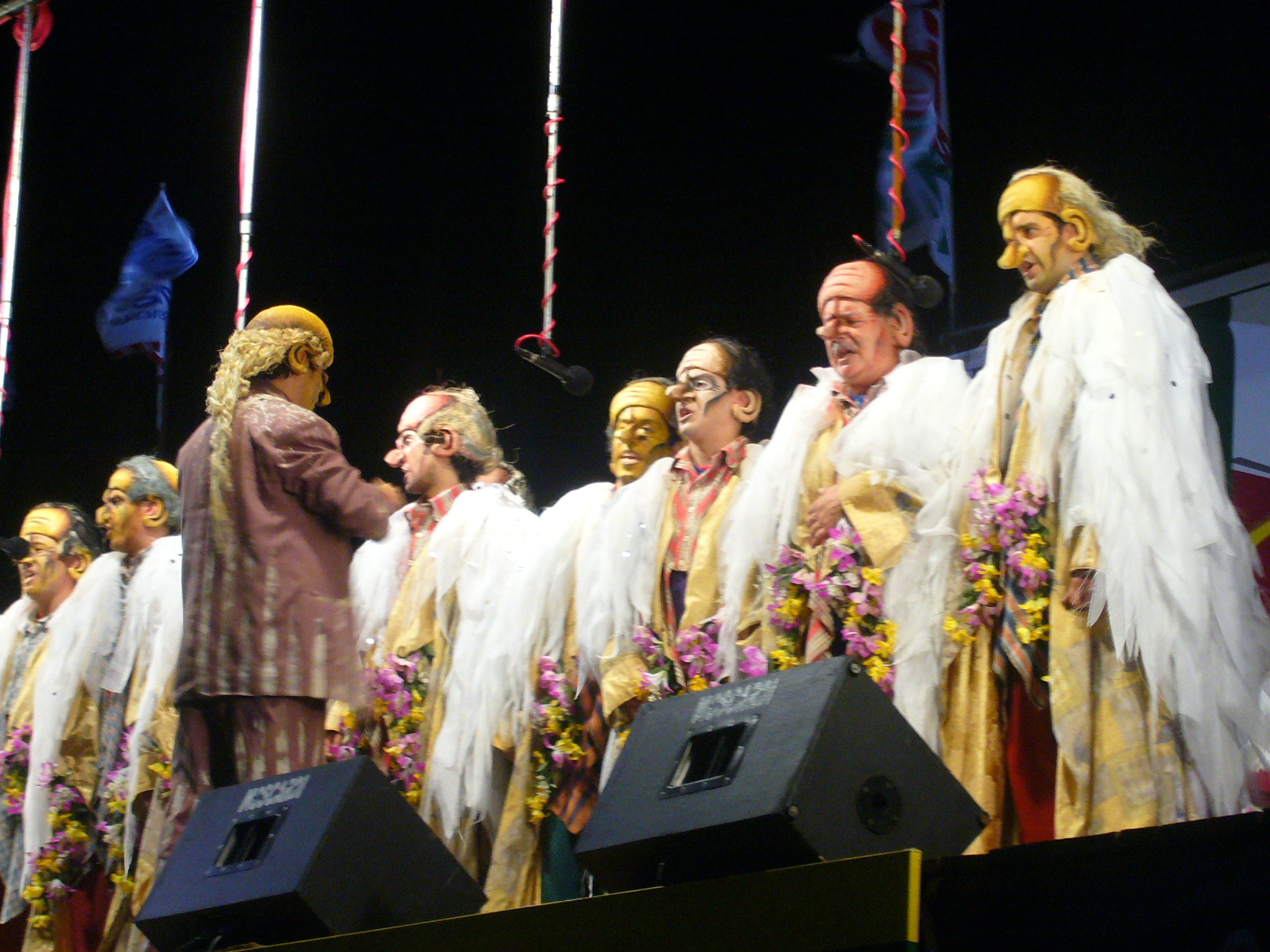 Fotografía de la murga "Agarrate Catalina" durante el carnaval uruguayo de 2008.